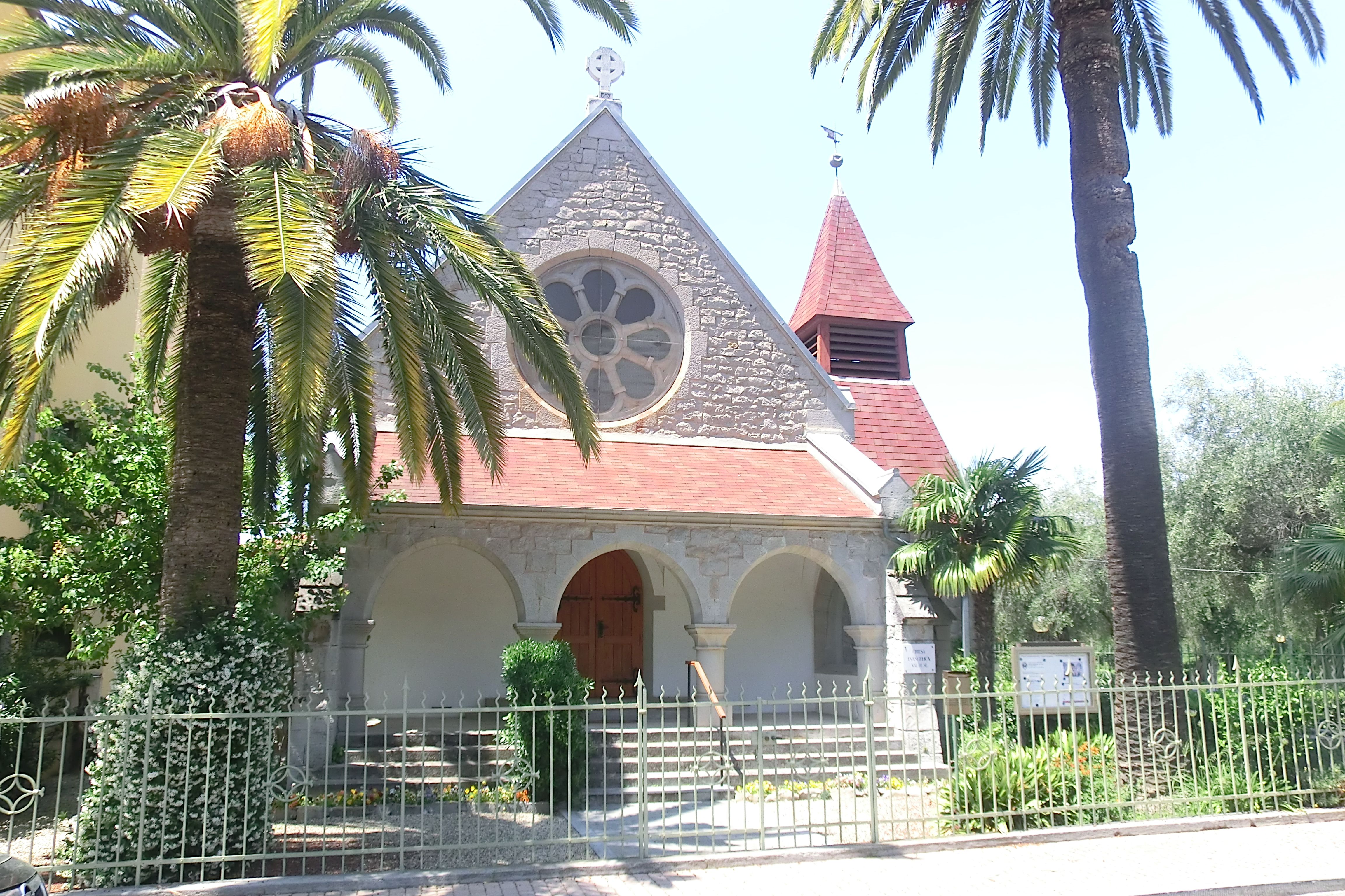 Chiesa Evangelica Valdese di Bordighera